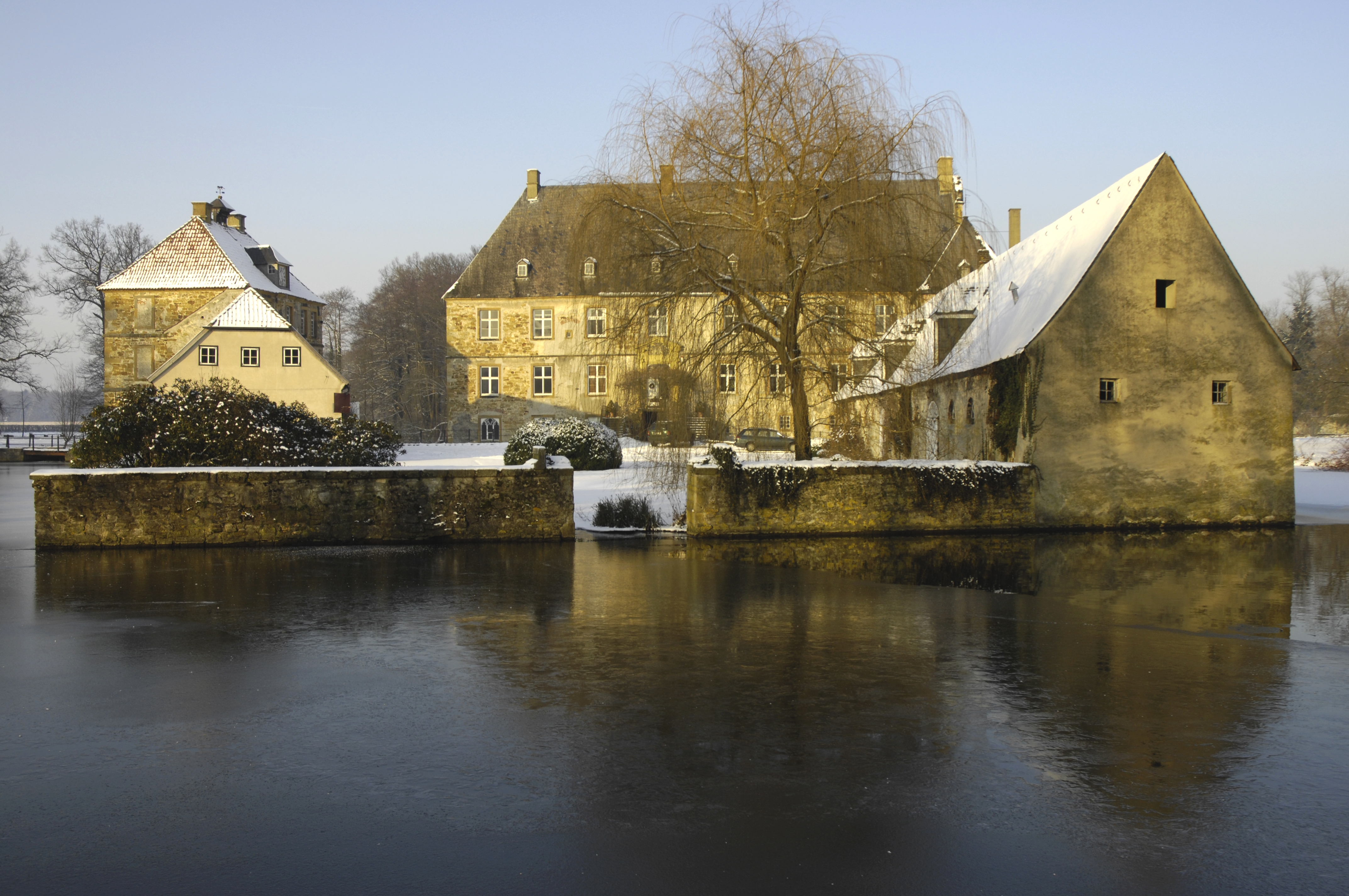 Halle/Westfalen, Schloss Tatenhausen